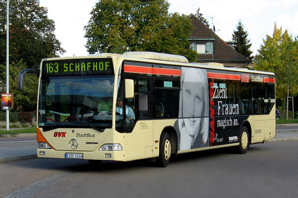 Mercedes-Benz Citaro des OVK, Kirchheim unter Teck